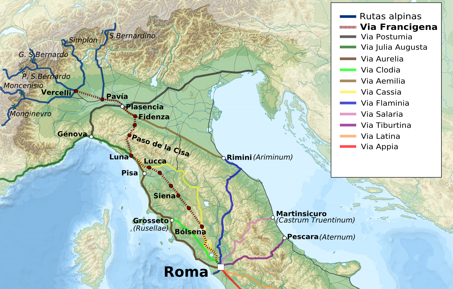 Trazado de la Vía Francígena en la red italiana de calzadas romanas. El mapa de calzadas romanas utilizado como base es